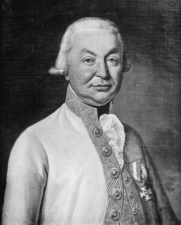 Johann Zoph (1738 – 1812), Rakouský císařsko-královský podmaršál. Portrét J. Zopha s řádem M. Terezie z doby po roce 1797.